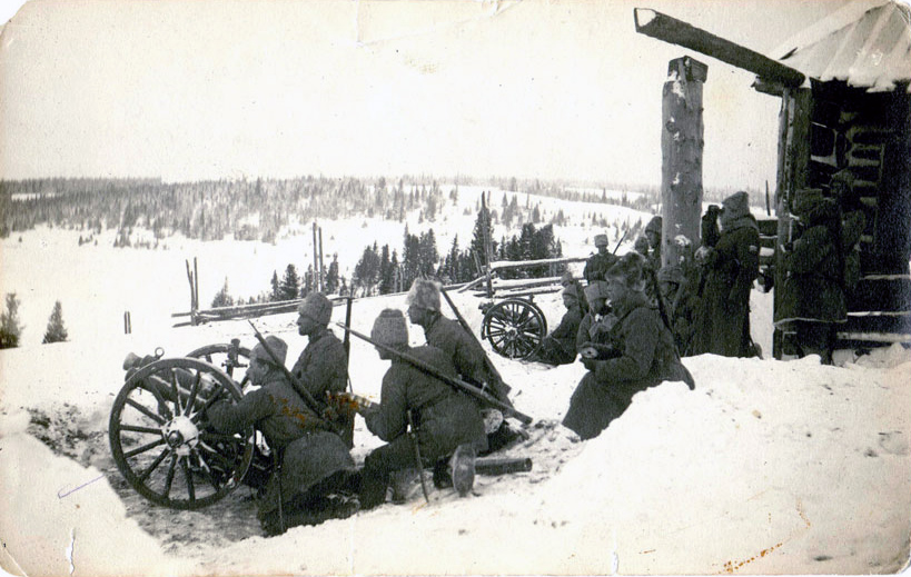 Артиллерия чехословацкого корпуса под Кунгуром (1918)